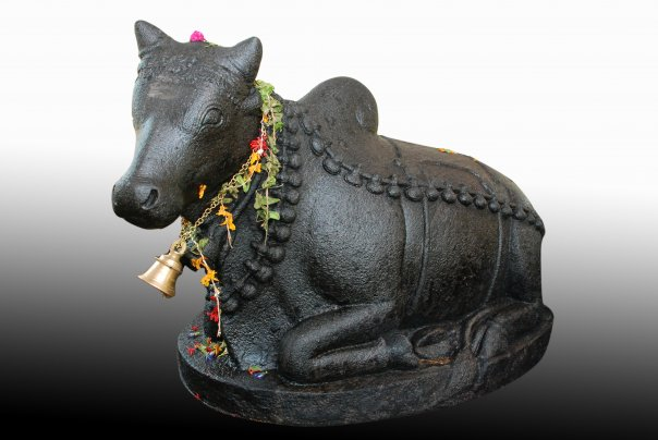 ഋഷഭ പ്രതിഷ്ഠ - നിരണം ക്ഷേത്രം